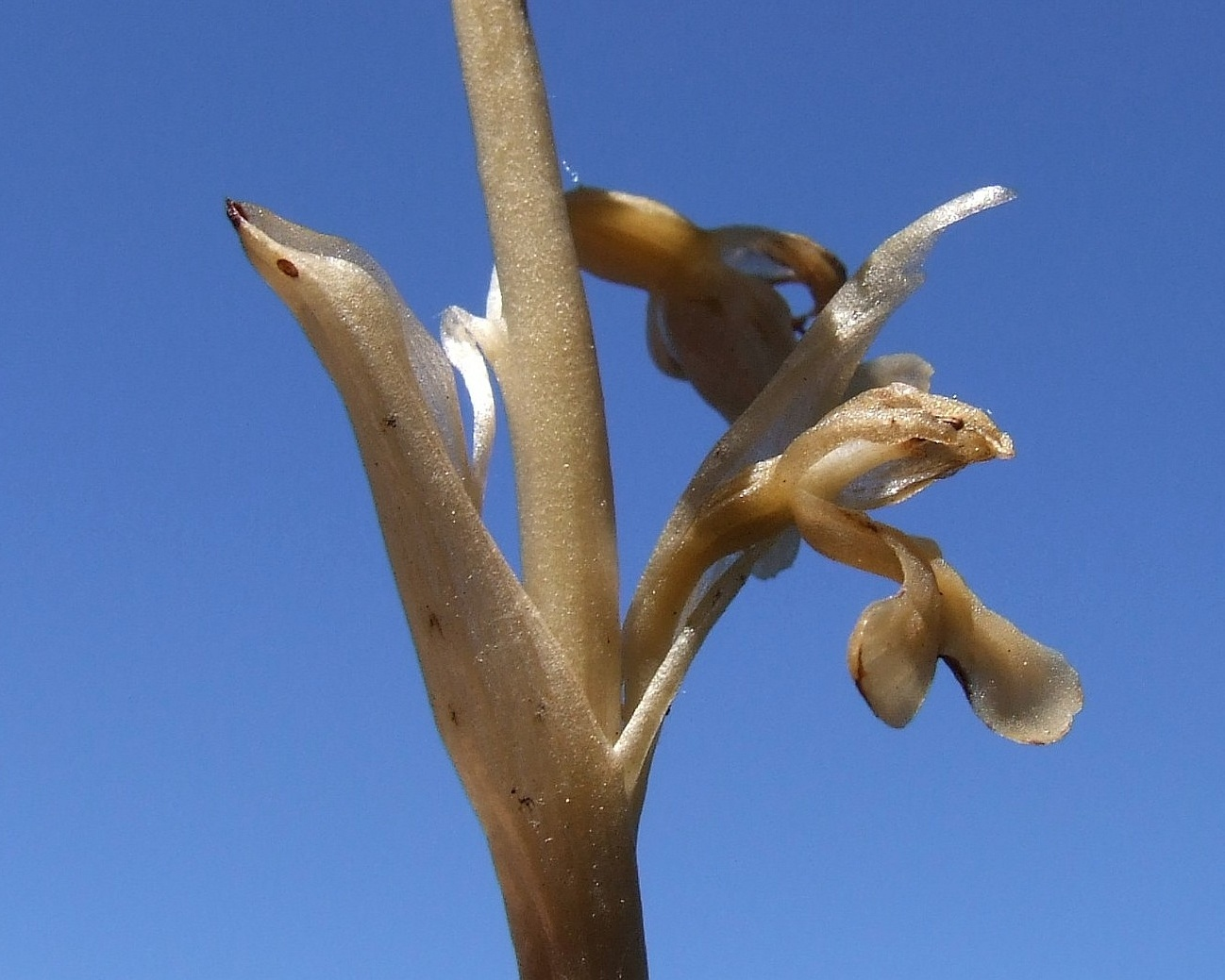 Neottia nidus-avis (habitat:Pieniny)